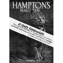 La presunta confessione di Frederick Cook apparsa sulla rivista Hampton's Magazine